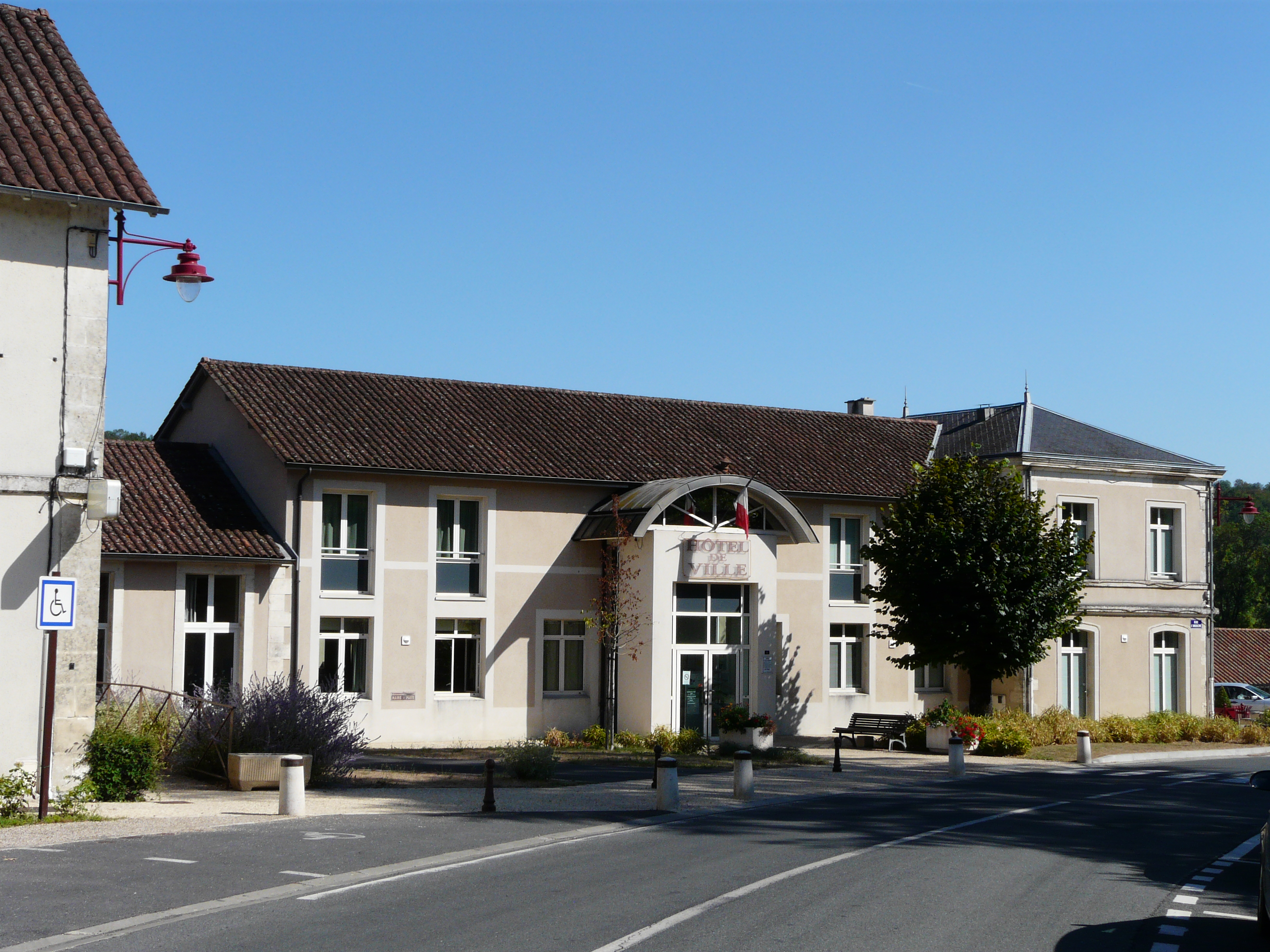 L'hôtel de ville de Château-l'Évêque, Dordogne, France.